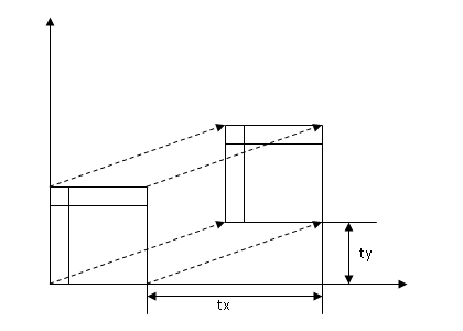 simple image describing a translation